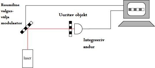 Kummituskuva_3